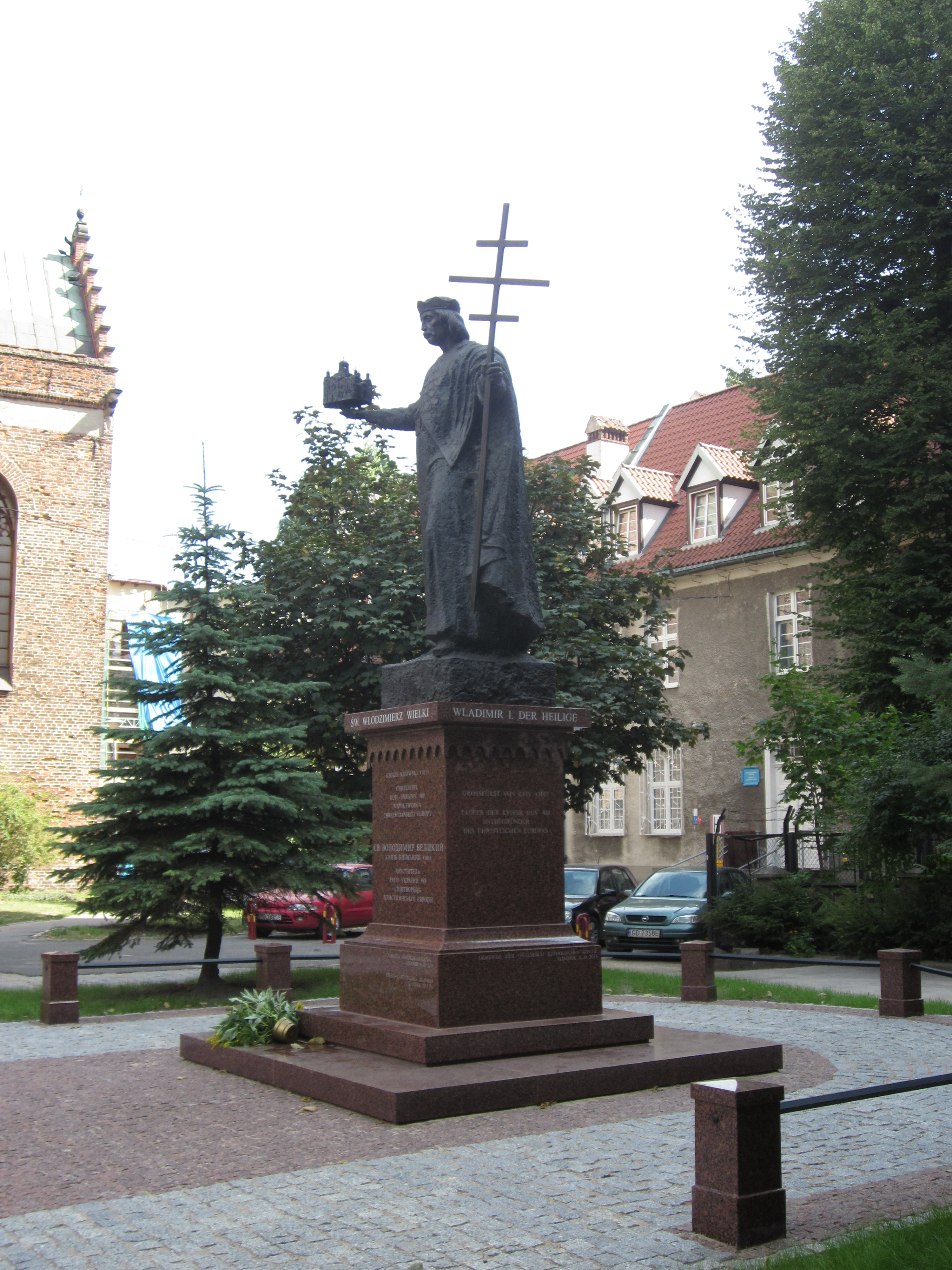 Statue Wladimirs des Heiligen vor der Bartholomäuskirche in der Danziger Altstadt.